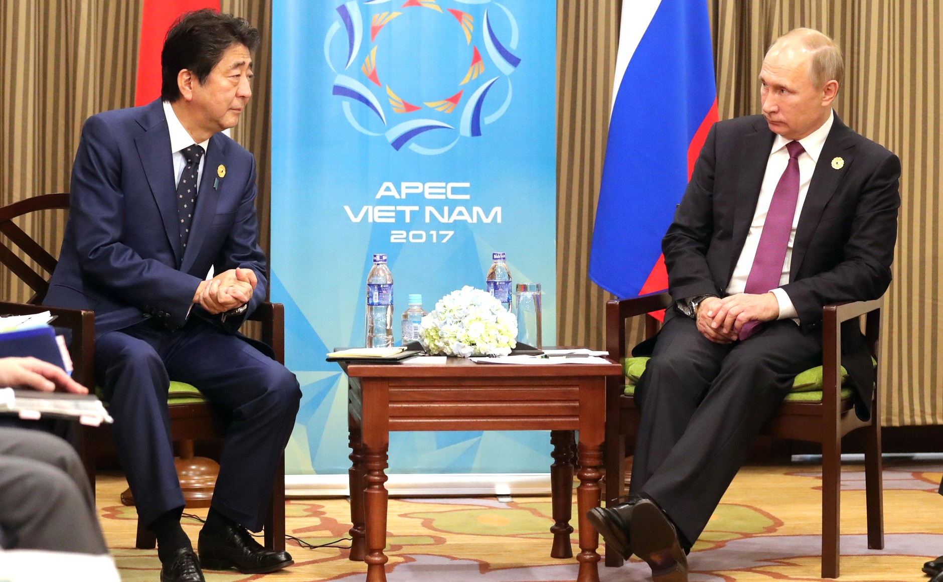 Встреча с Премьер-министром Японии Синдзо Абэ.